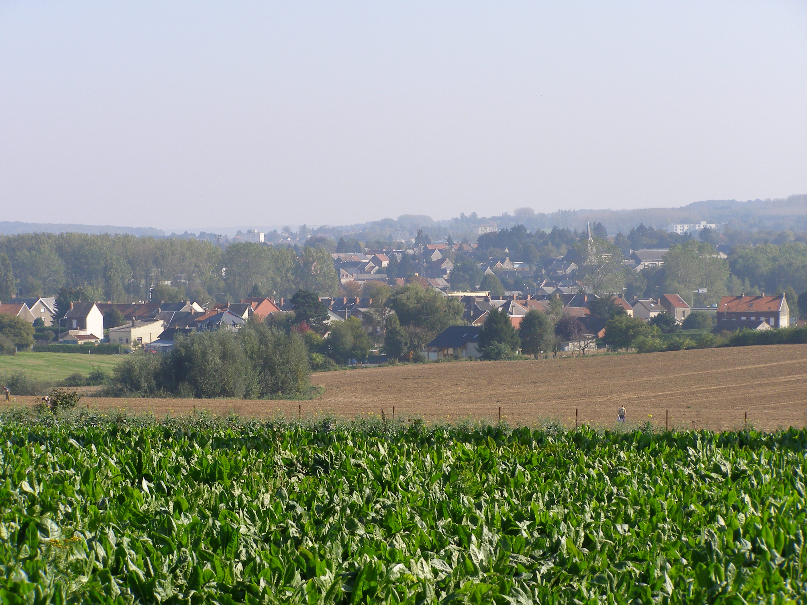 Vue d'ensemble.